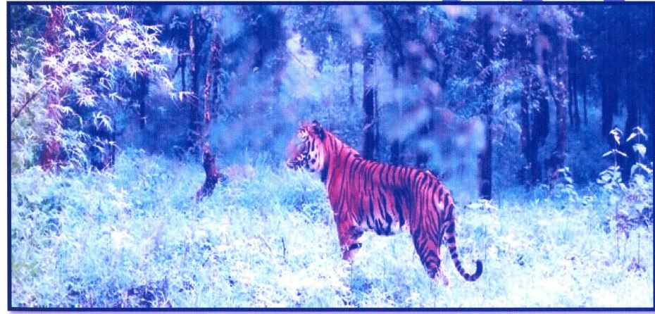 टॉडगढ